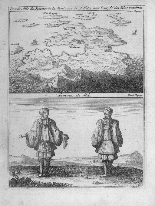 Milos in 1718